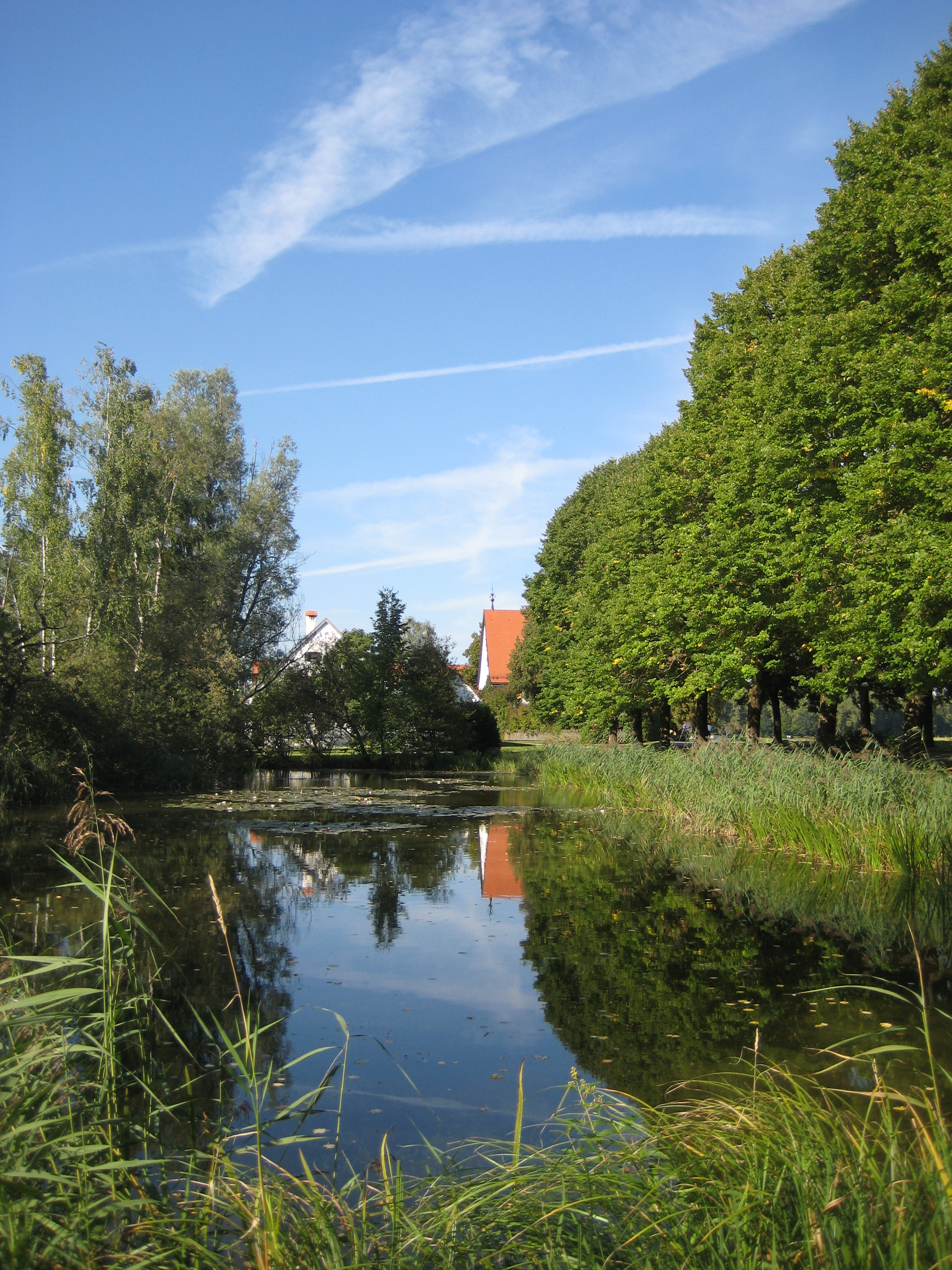 Weiher bei Zellhof bei Schöngeising.